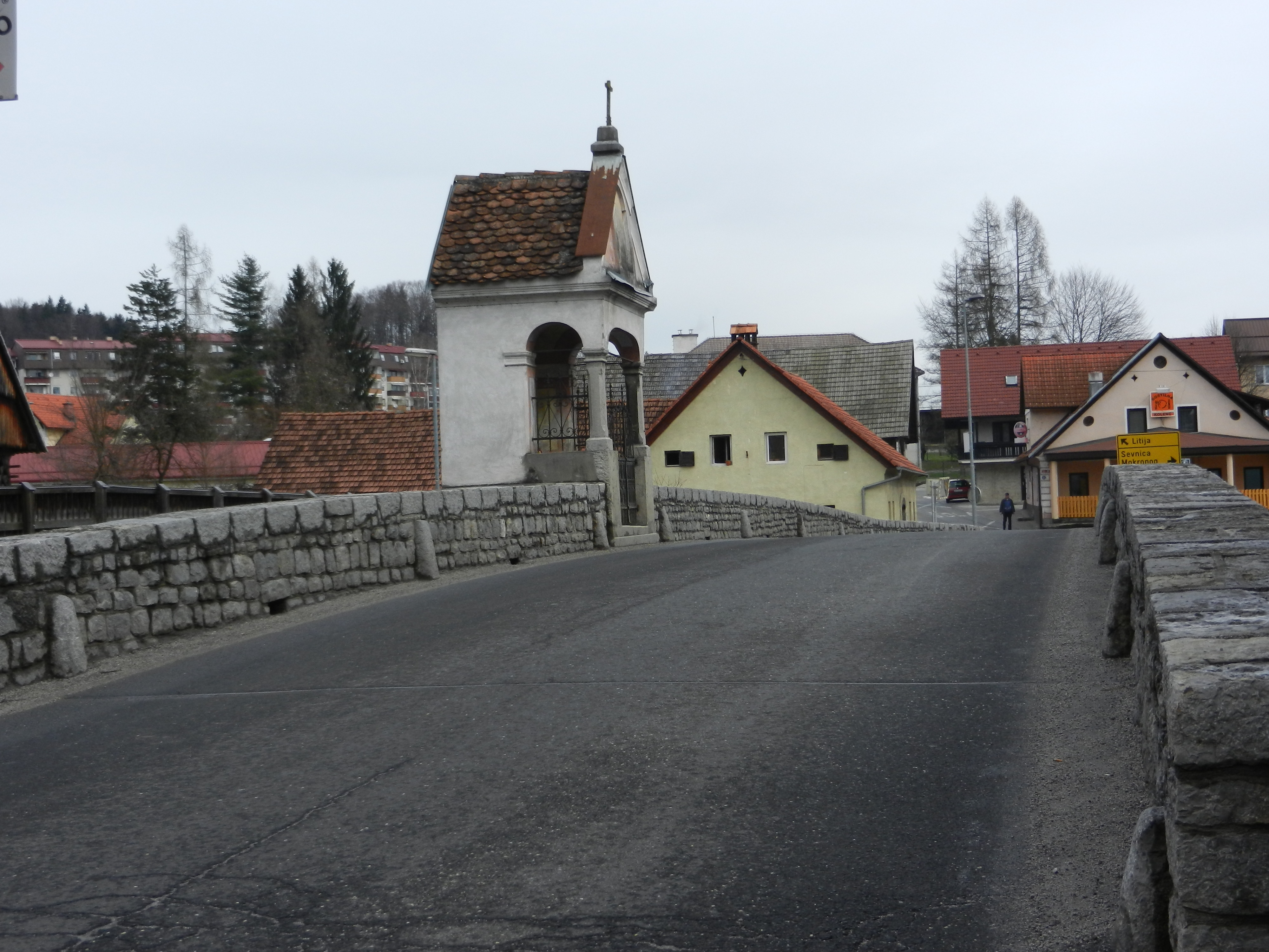 Kamniti most čez Mirno na Mirni